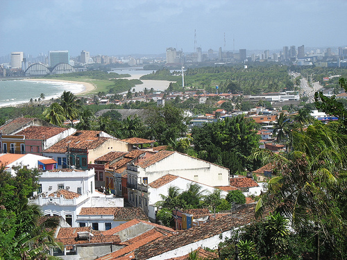 11 de julho de 2008: ao fundo, à direita, uma área verde que pretende ser, em alguns anos, o novo estádio para a Copa de 2014.